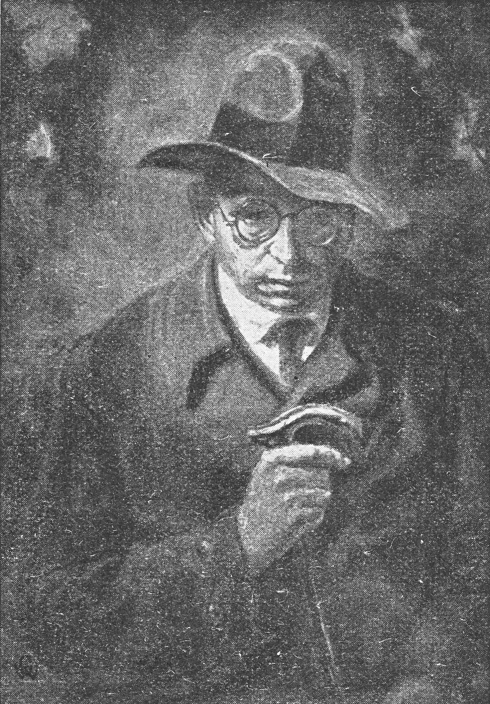 Fritz Flebbe: Ewald Banse, Ölgemälde.